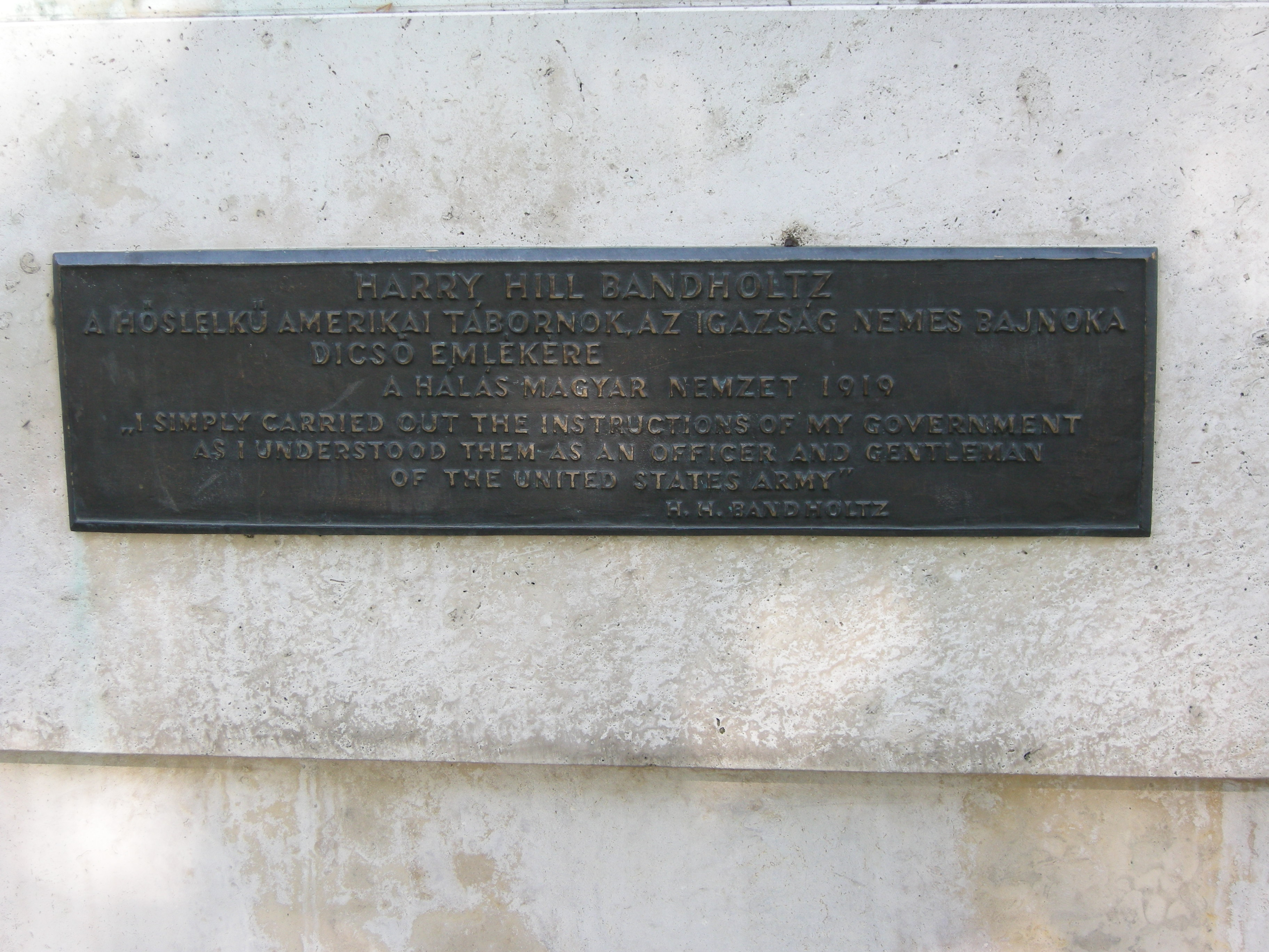 Budapest